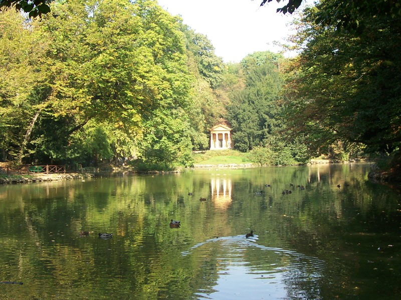 Monza - Laghetto nel giardino della Villa Reale di Monza